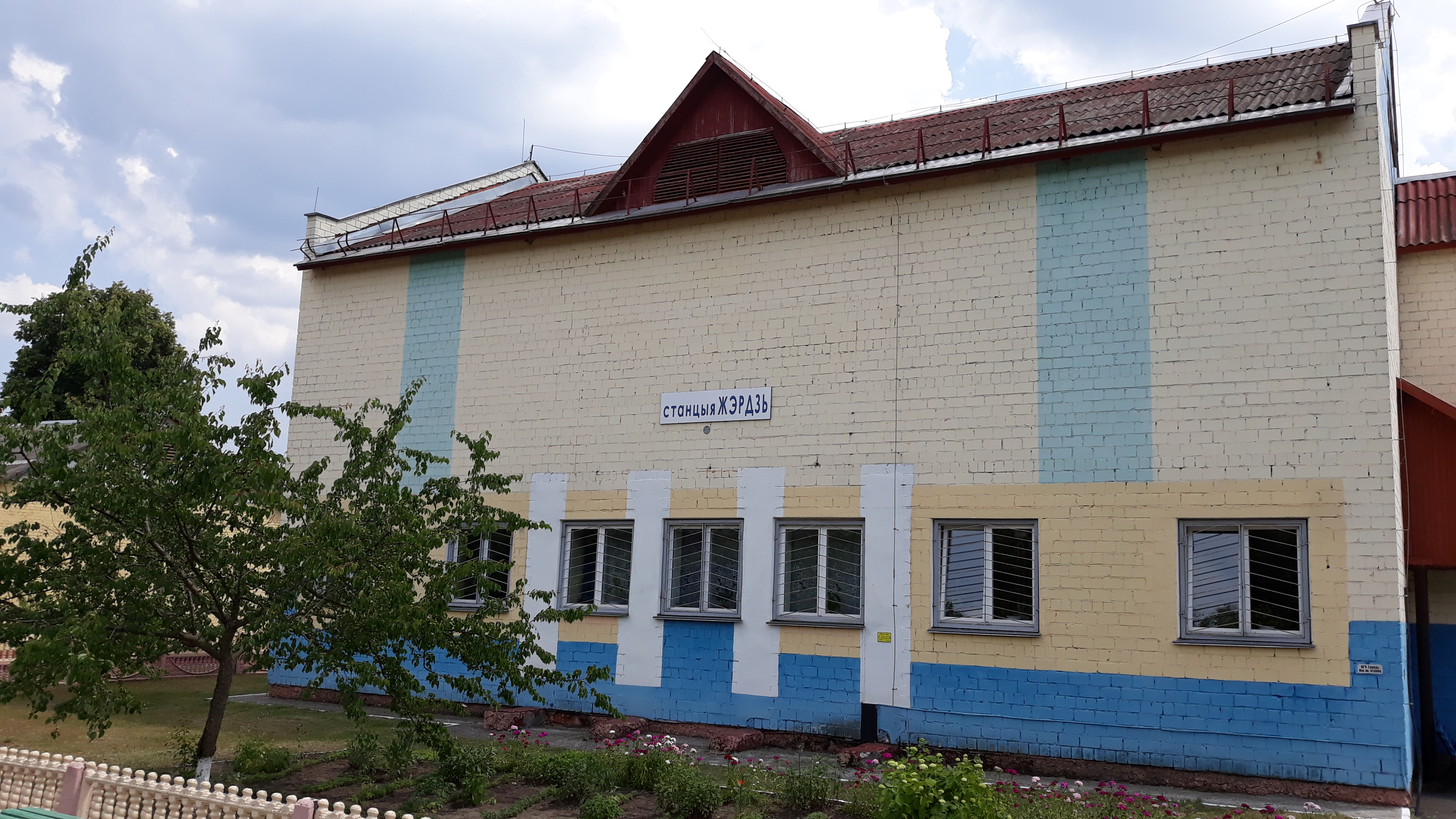 станцыя Жэрдзь